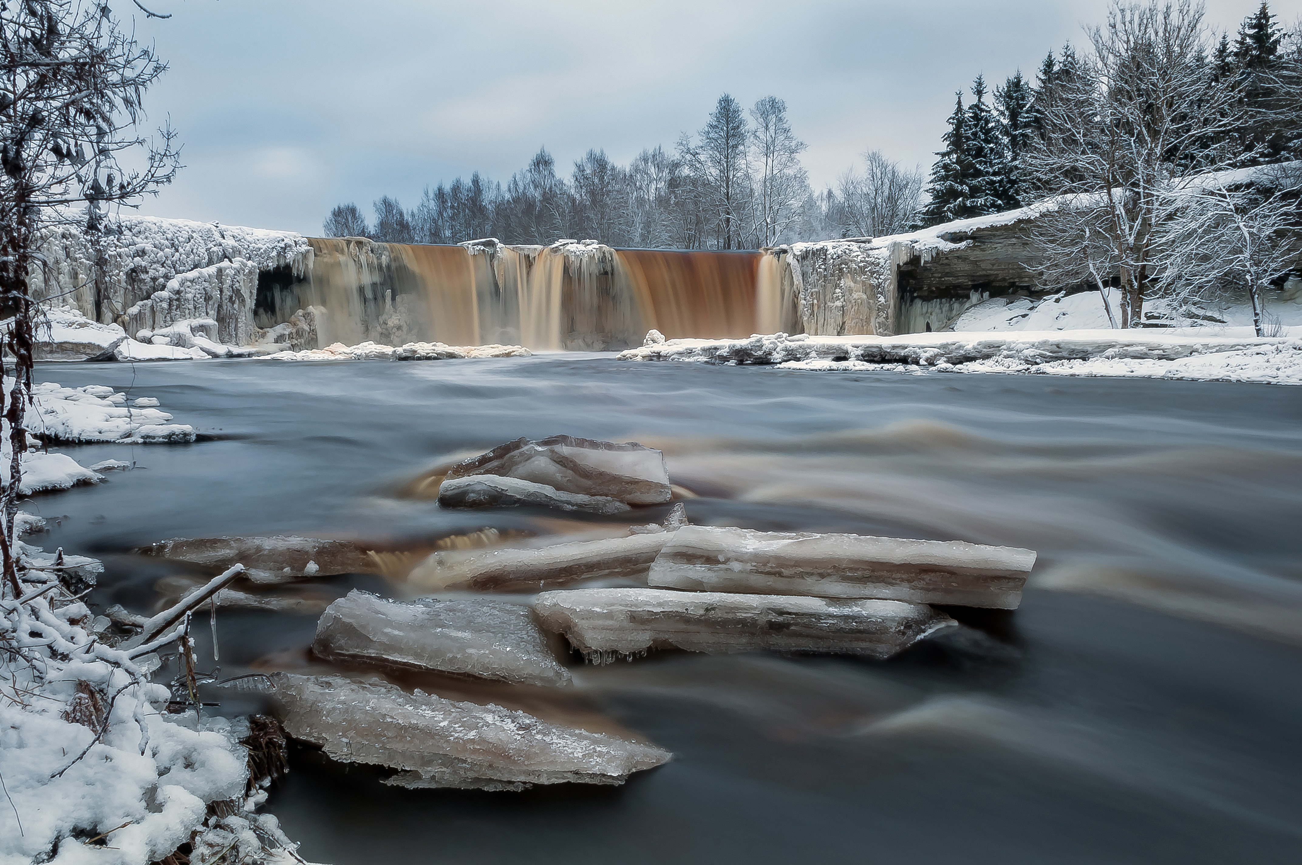 Jägala juga talvel.